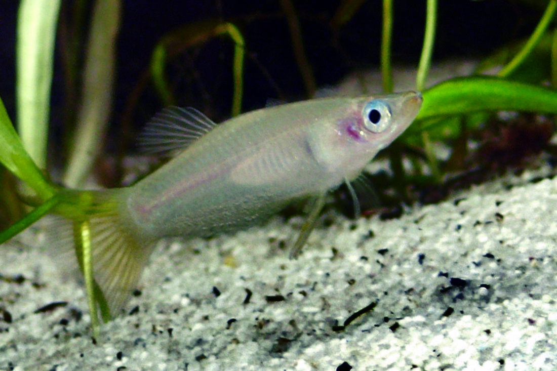 Messerkärpfling (Alfaro cultratus)